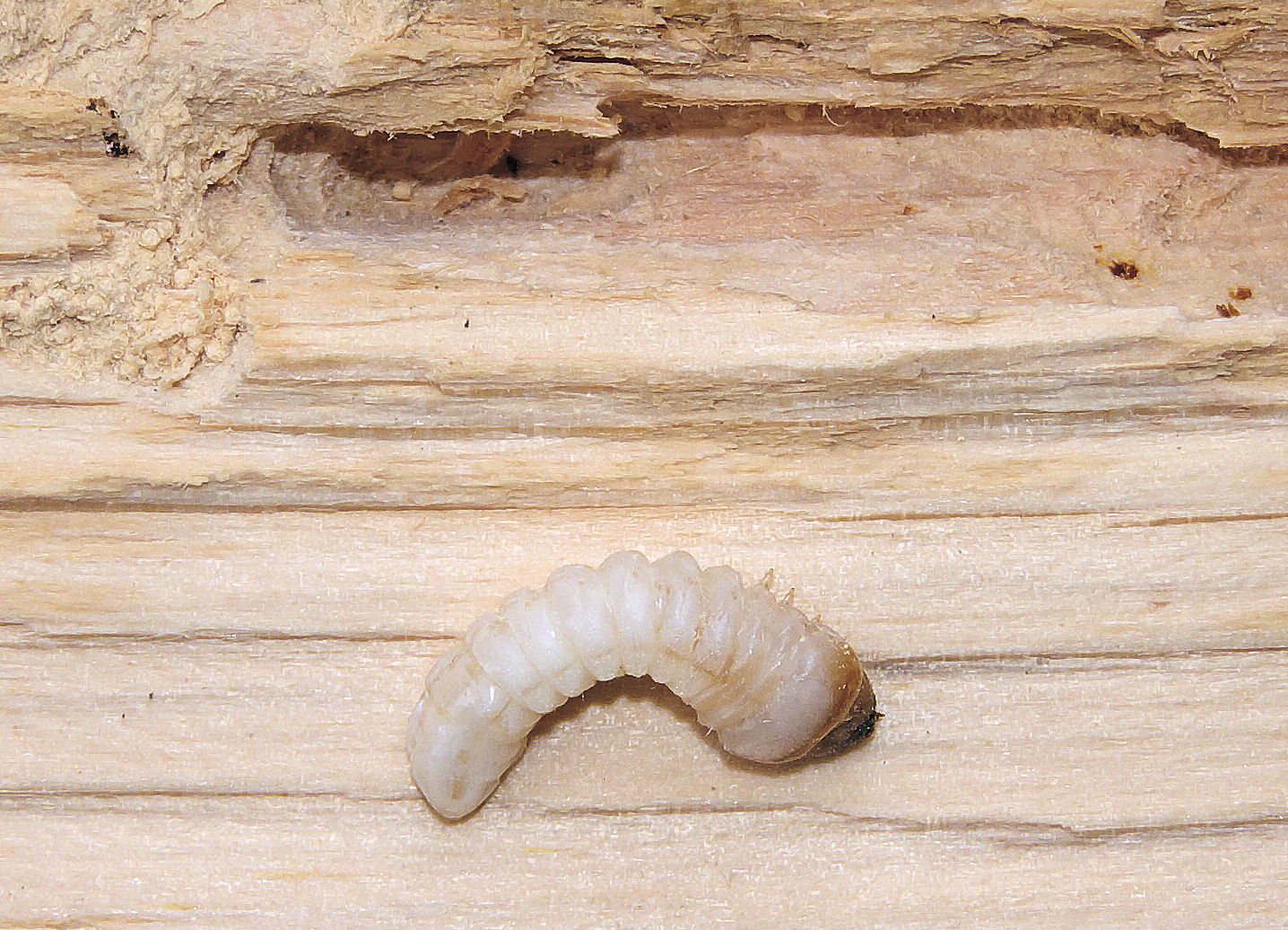 Hylotrupes bajulus (huisboktor) in grenenhout